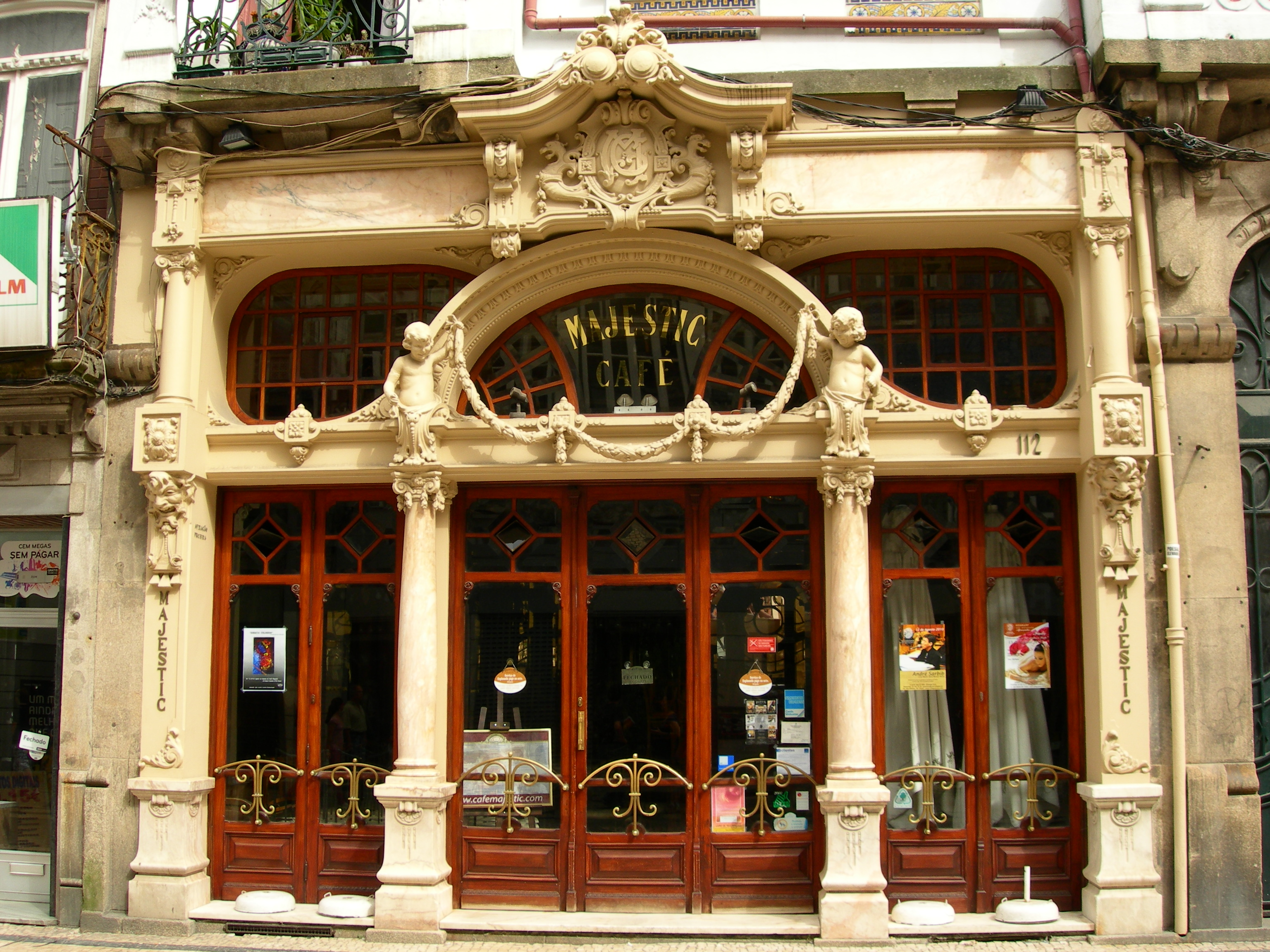 Café Majestic (Porto) This file was uploaded for Wiki Loves Monuments in Portugal with the unique identifier 74502.